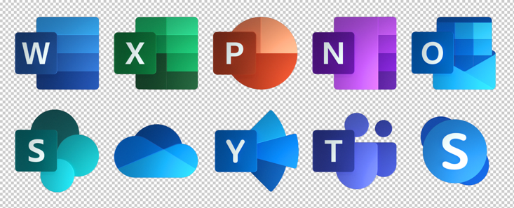 Ikon baru Office 365